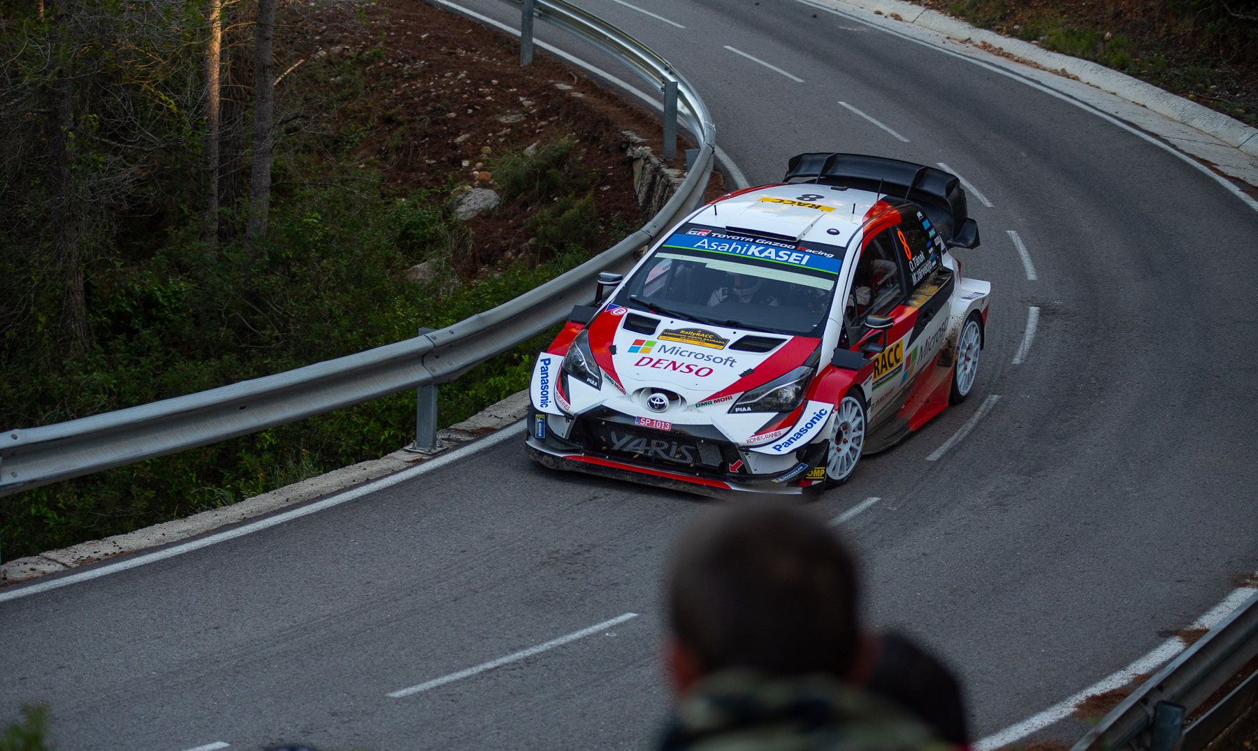 Rajd Hiszpanii 2019 - Tänak Ott